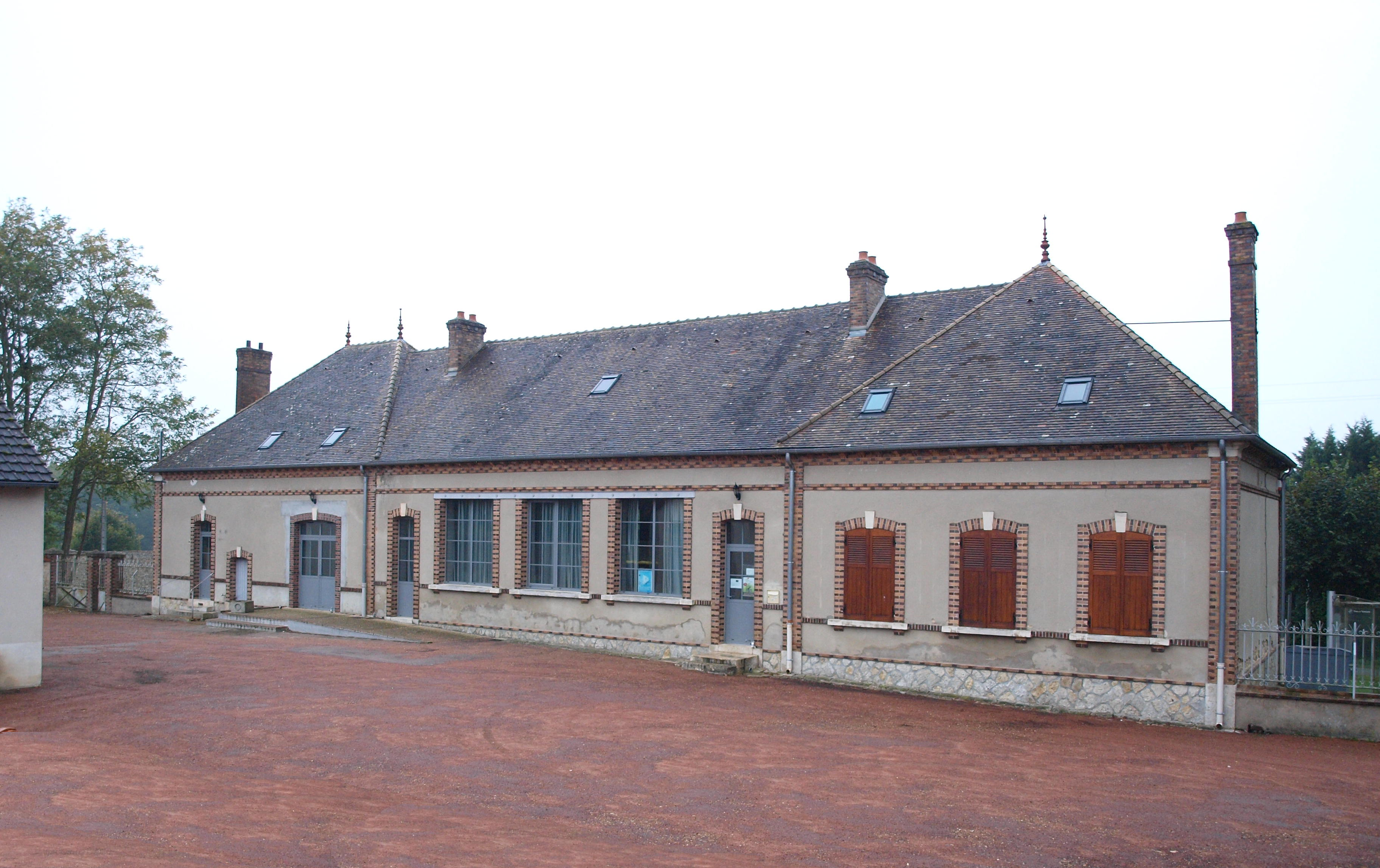 Chevry-sous-le-Bignon (Loiret, France) , ancienne mairie-école.